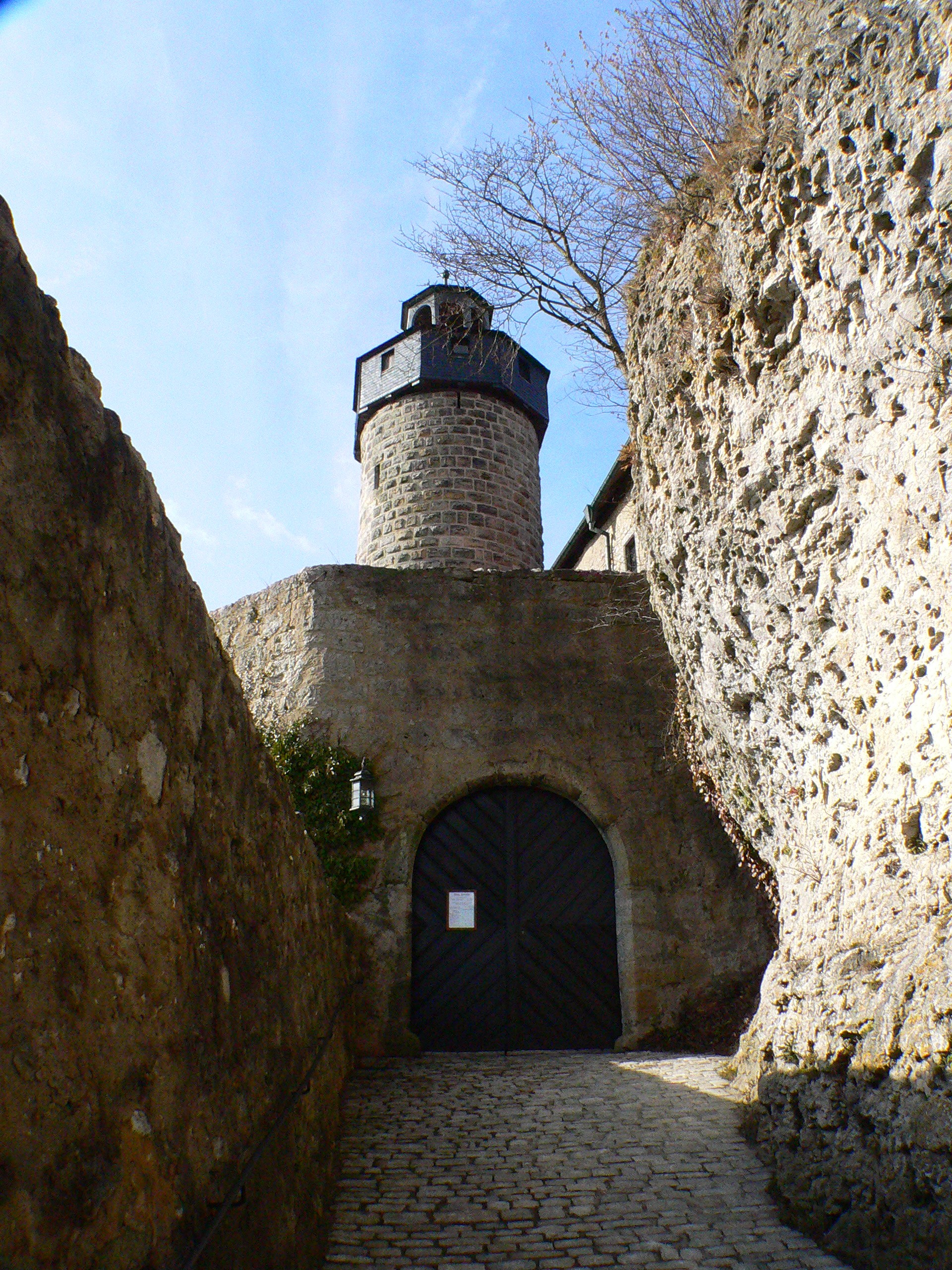 Burg Zwernitz Aufgang Niederburg, Wonsees-Sanspareil, Fränkische Schweiz, Bayern